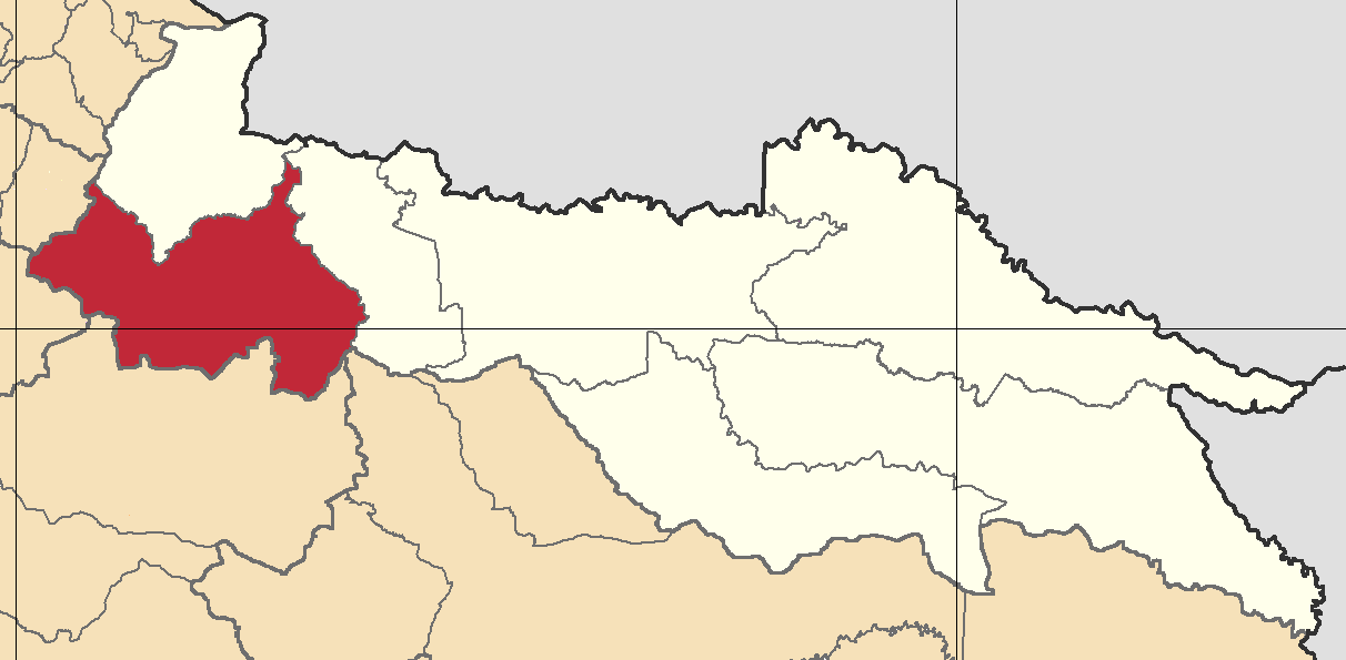 Mapa localizacor del cantón Gonzalo Pizarro, Sucumbíos, Ecuador